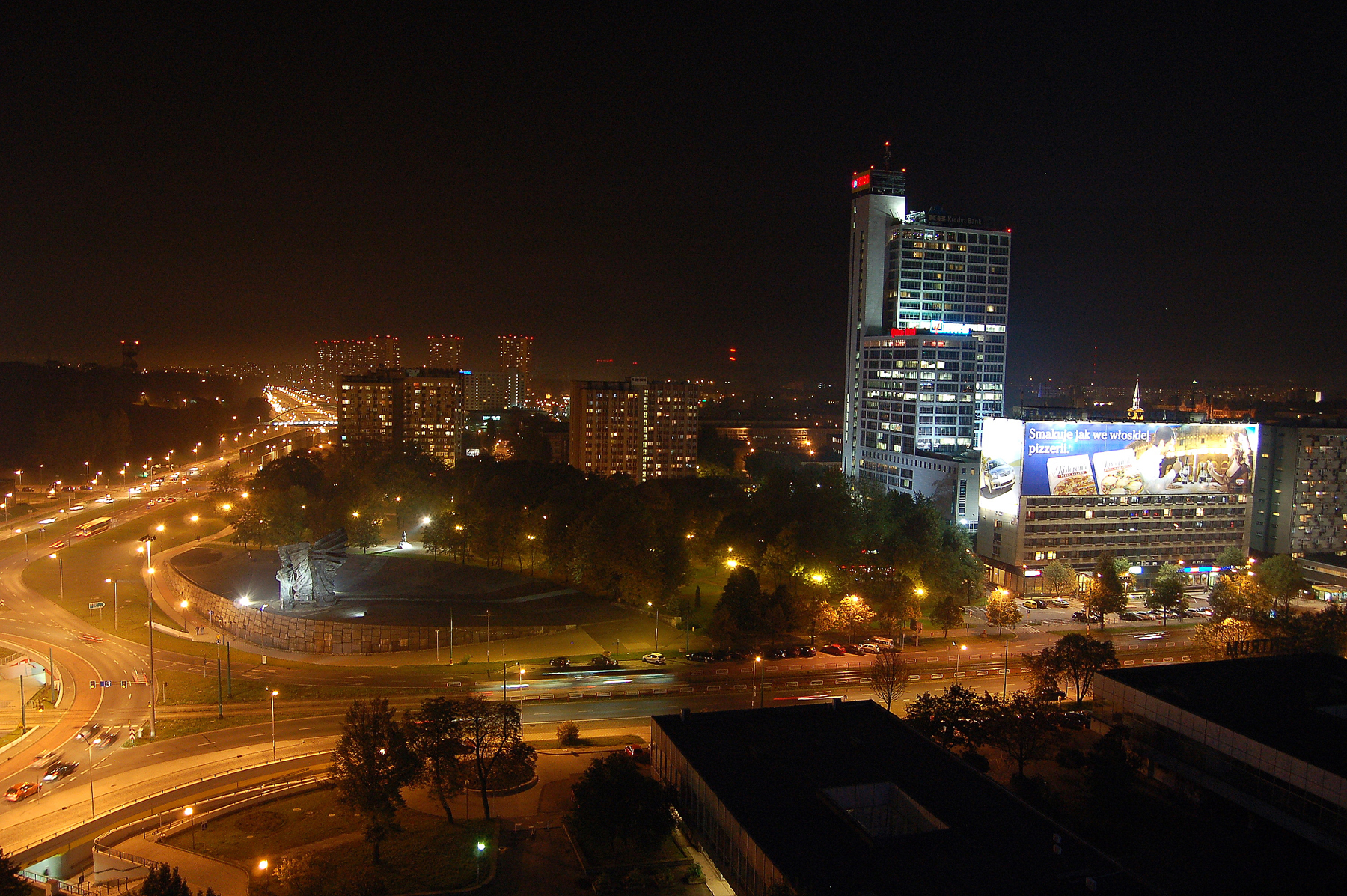 Altus wieczorem